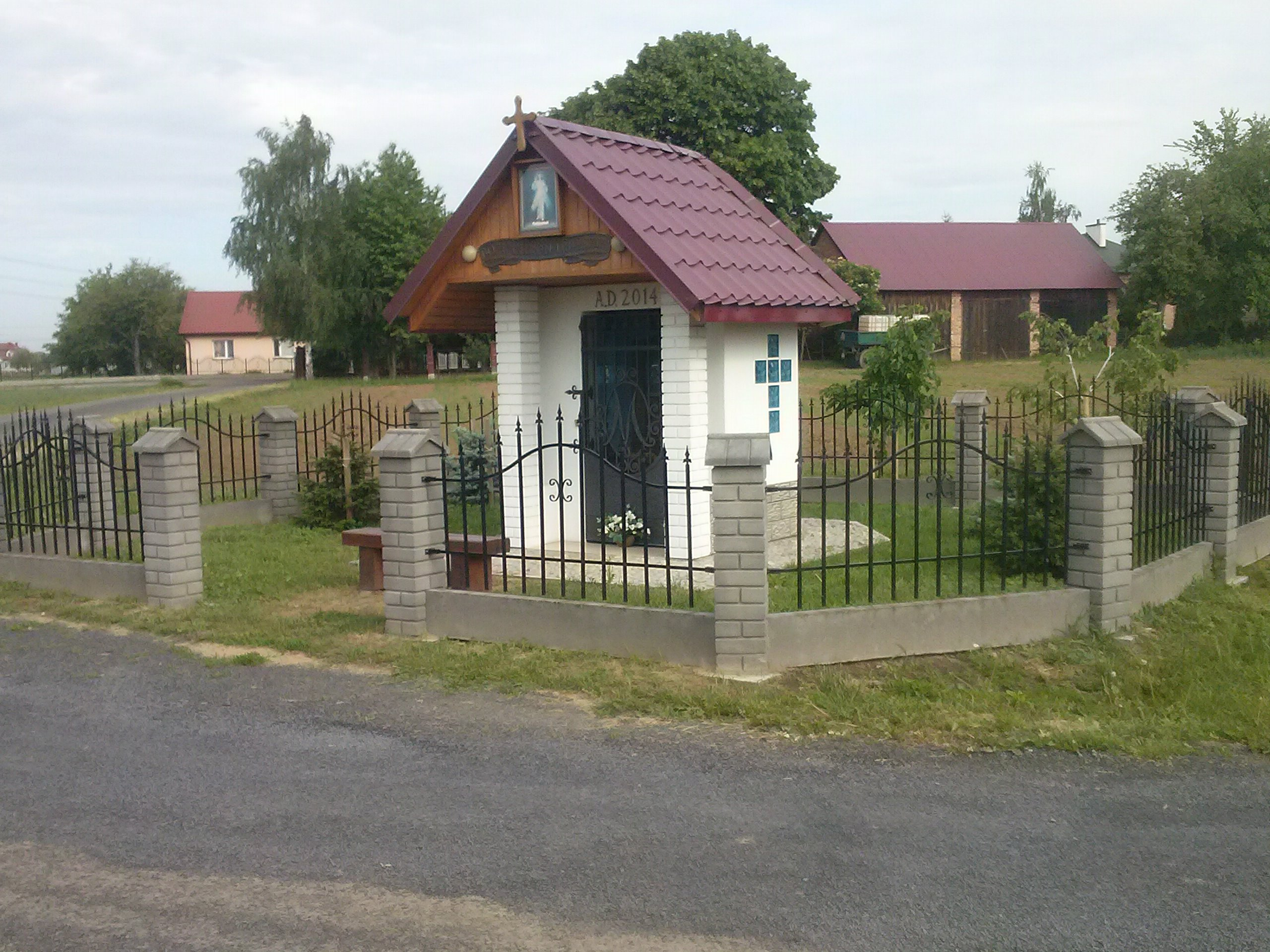 Kapliczka w Ubieszynie z 2014 roku